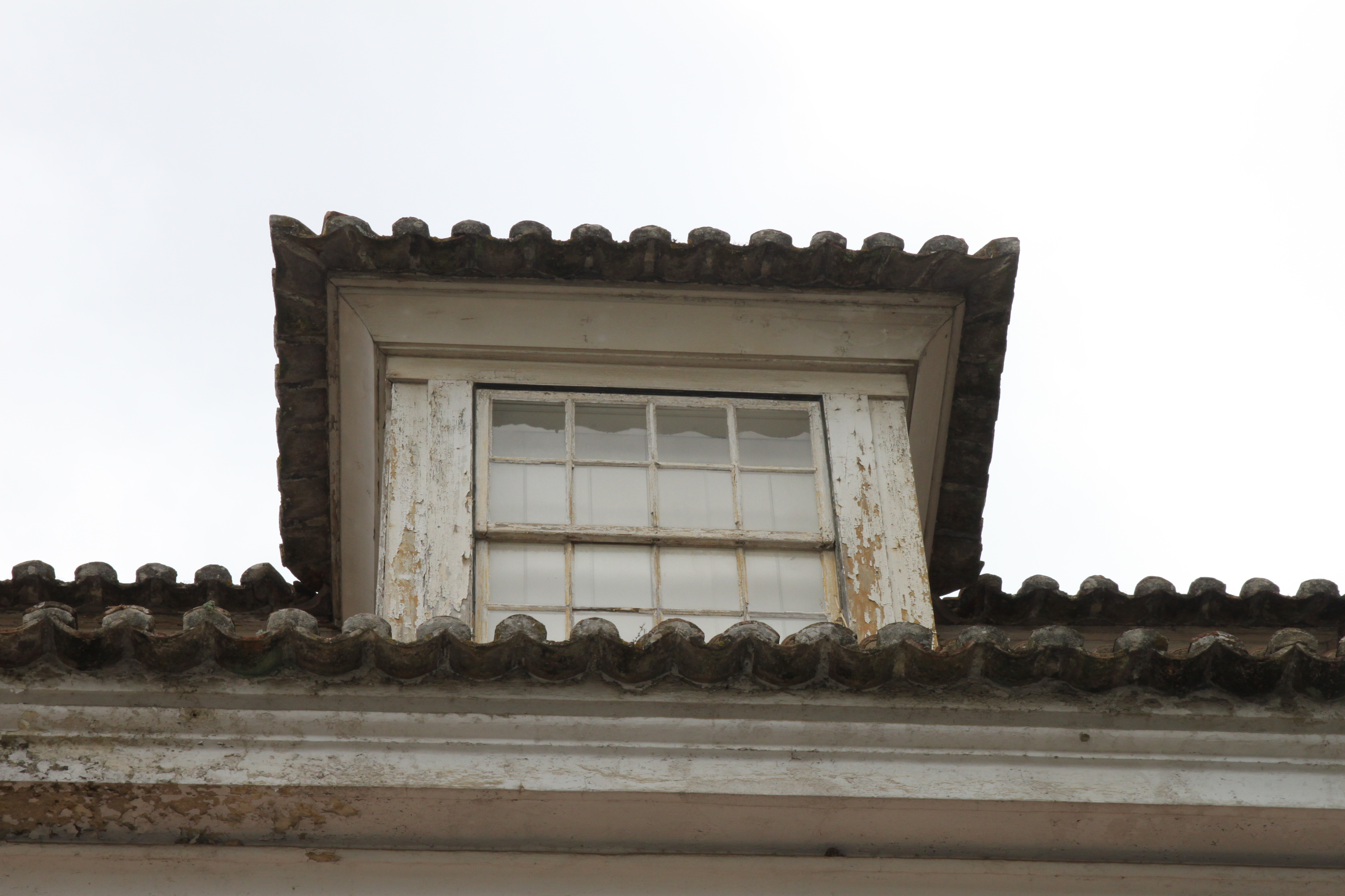 Palácio do Monteiro-Mor This file was uploaded for Wiki Loves Monuments in Portugal with the unique identifier 74720.